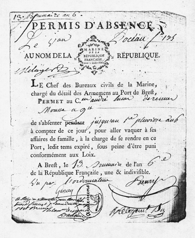 Congé de marin : autorisation de retour dans sa famille d'un mousse donnée à Brest en l'an VI. Hauteur : 19 cm.